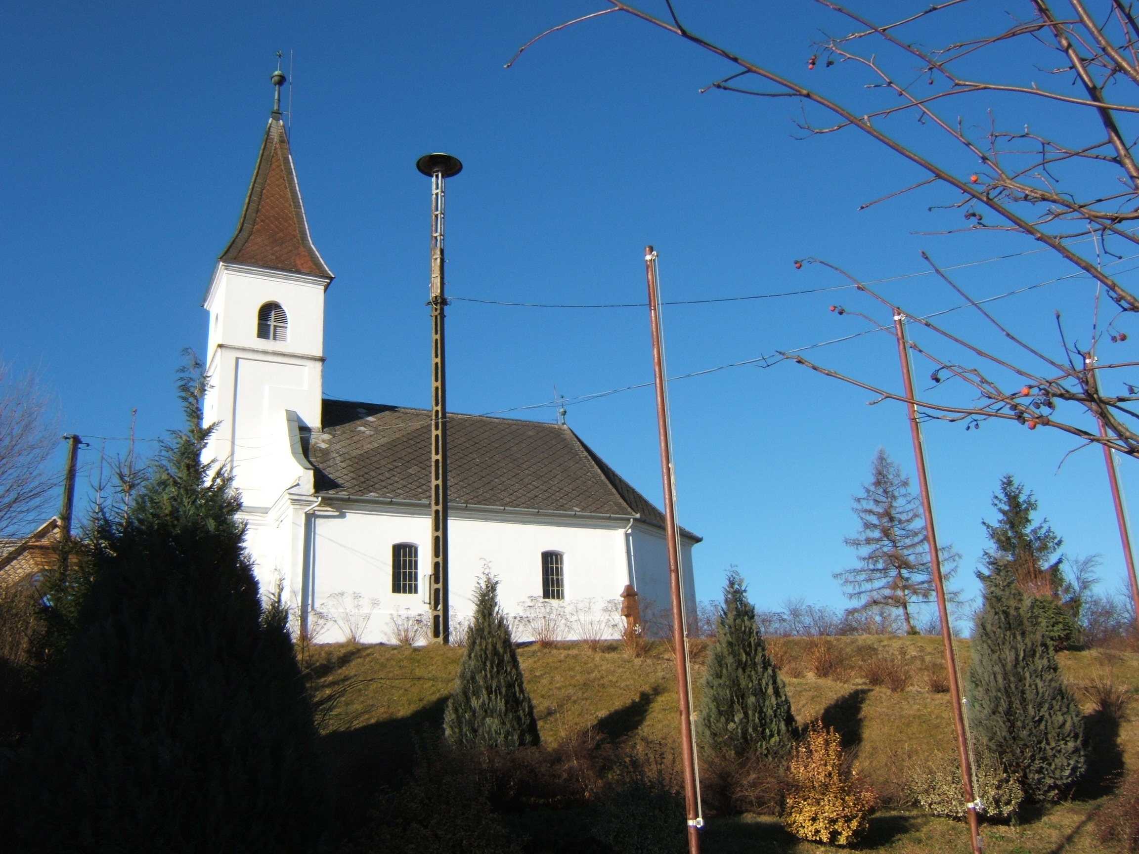 Szilvásszentmárton, Református templom, azonosító 8119 (törzsszám 9419), késő klasszicista, 1844. Átépítve 1928-ban.